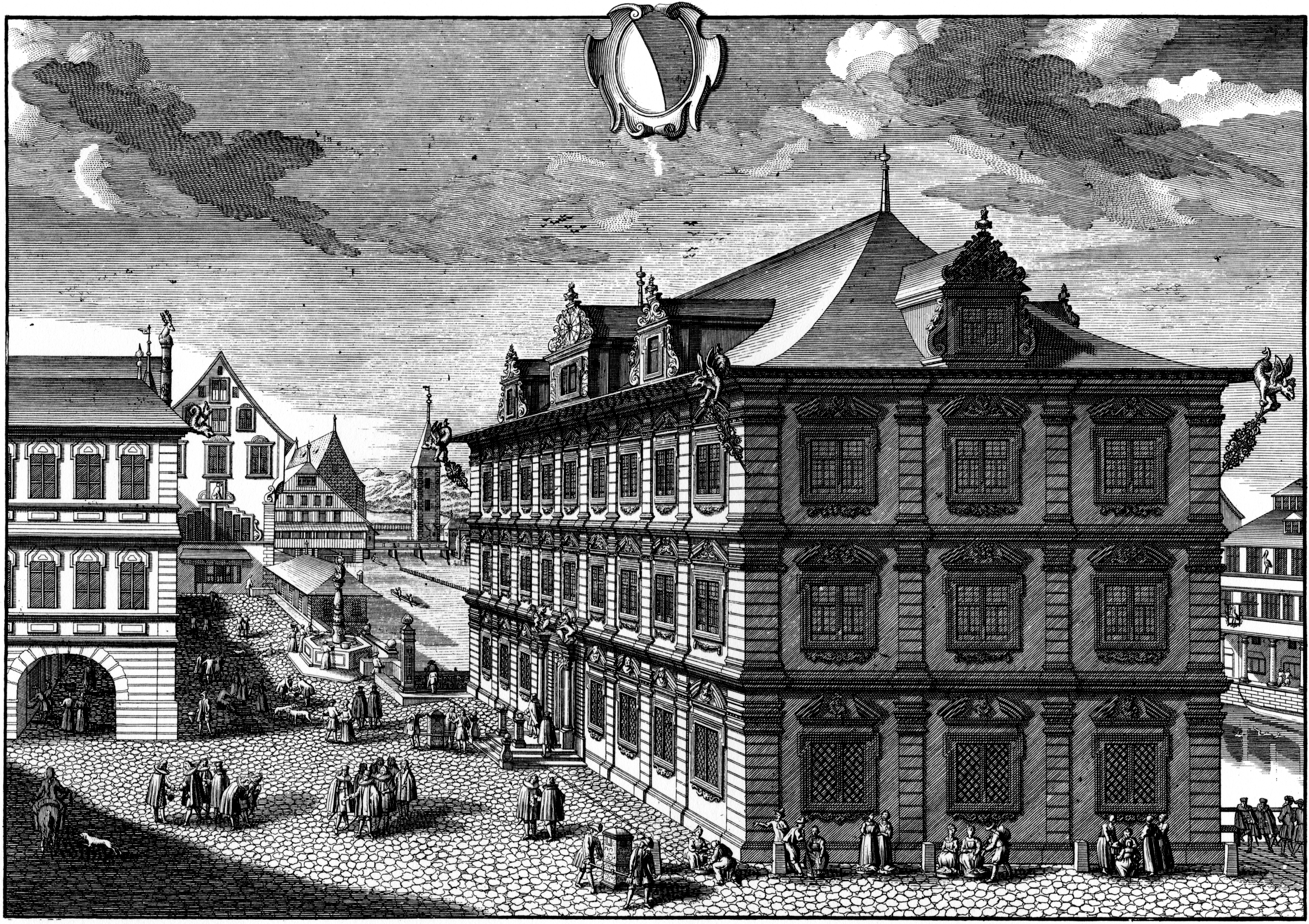 Das Rathaus und das Limmatquai in Zürich ca. 1740. Radierung von David Herrliberger. Originaltitel: «[I]n perspectivischer Vorstellung des Rahthauses und kurtzer Beschreibung über selbiges samt der bey Einweihung desselbigen von Ihro Gnaden HHrn. Joh. Heinr. Eschers sel. vortrefflich gehaltener Einweyungs-Rede». Erschienen 1740 in der Reihe Vorstellung Loblichen Standts Zürich Schlösser oder so genante Ausere Vogteyen